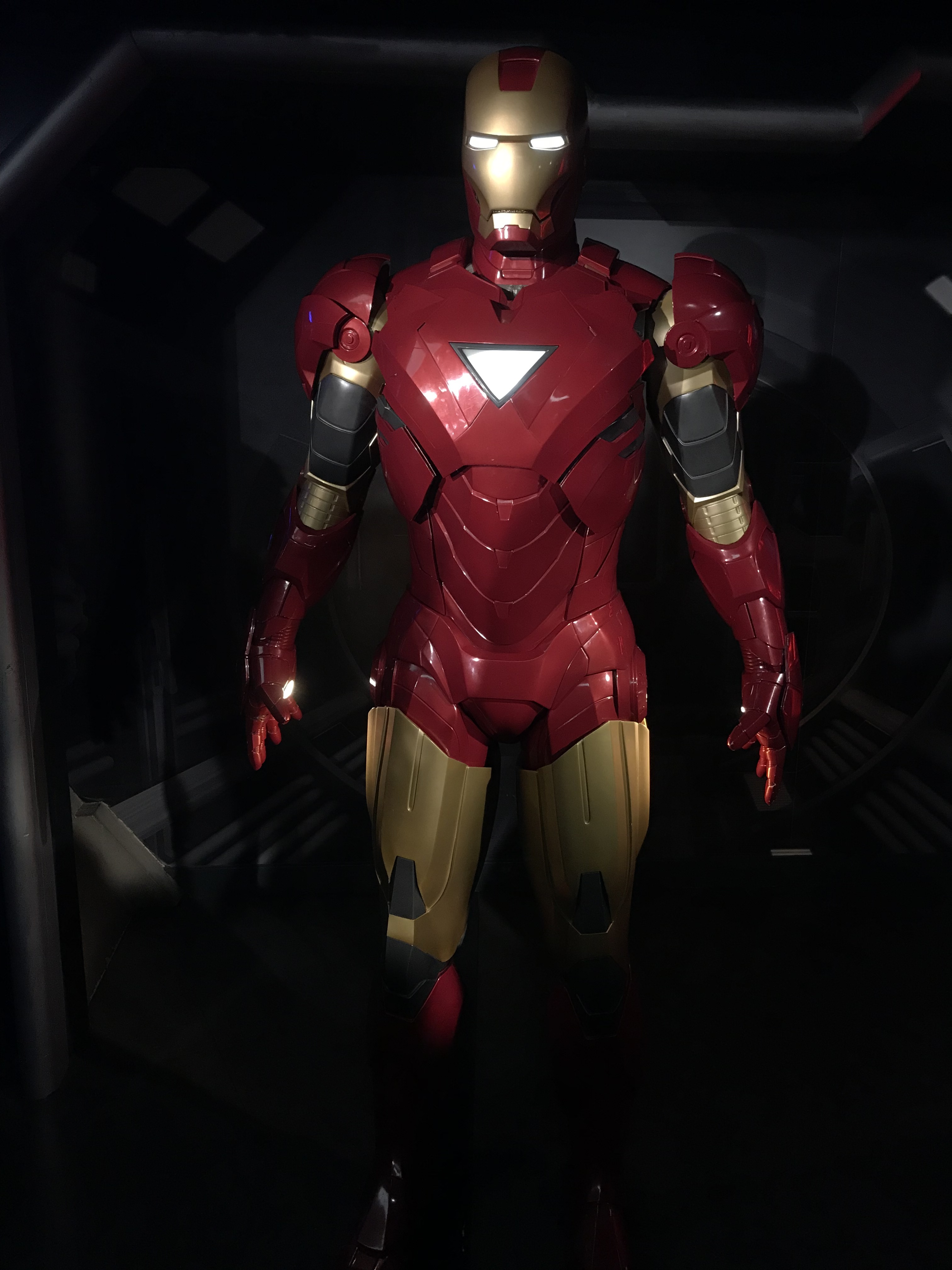 Iron Man at Madame Tussauds London, July 17, 2019.